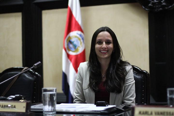 Natalia Díaz, diputada de Costa Rica 2014-2018 del Movimiento Libertario.